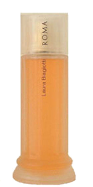 Roma (profumo), il primo profumo creato da Laura Biagiotti